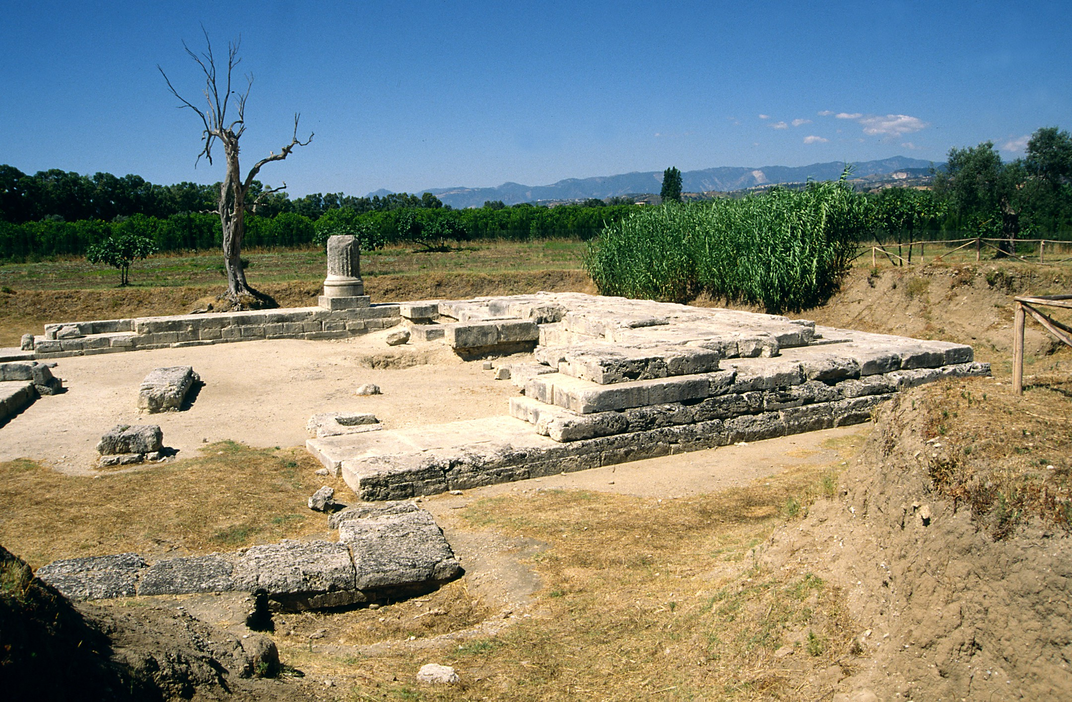 Scavi di Locri Epizefiri. Zona del tempio ionico nel 1996.